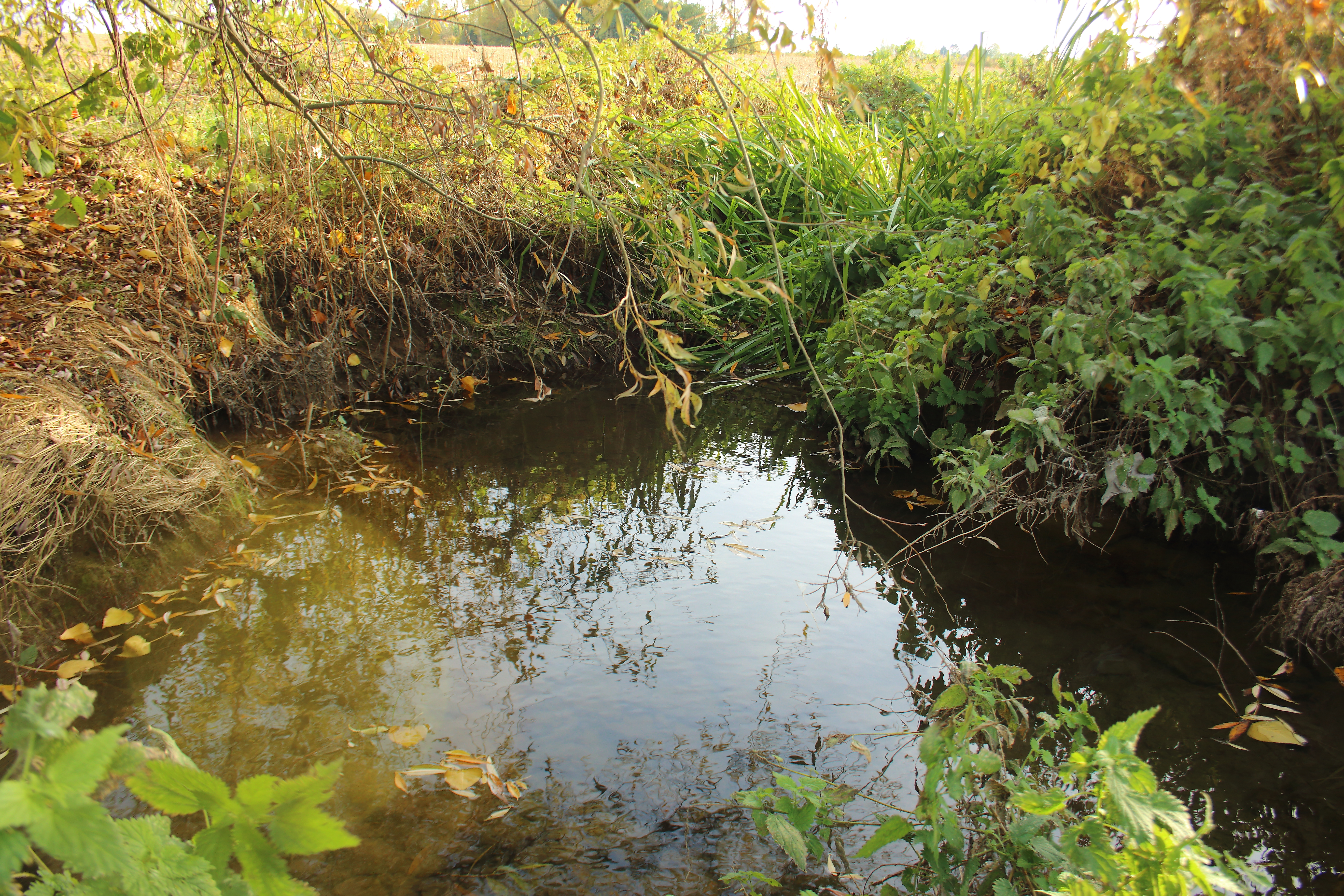 Steenmeersbeek, Grotenberge, Zottegem, Vlaanderen, België